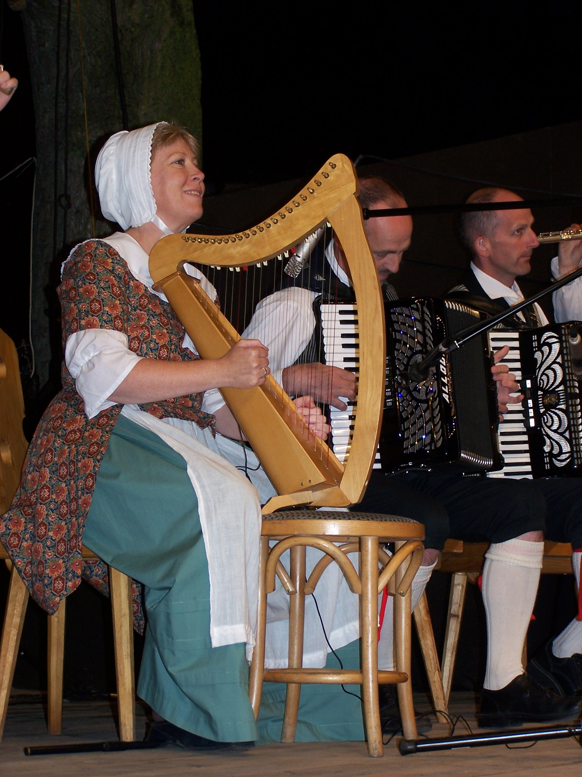 Występ zespołu Dawnswyr Môn z Bethel (Walia) podczas 43. Tygodnia Kultury Beskidzkiej w Żywcu.